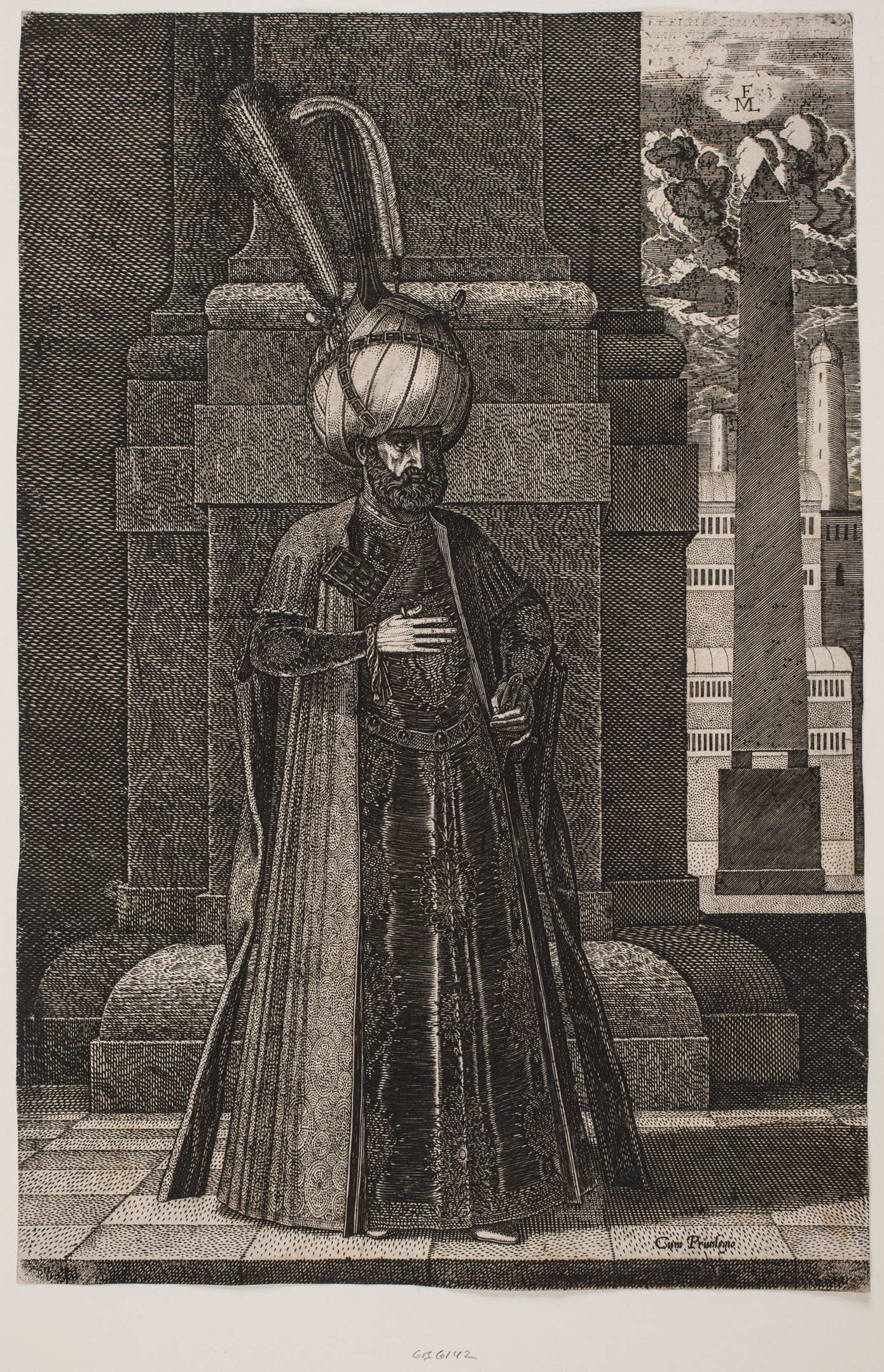 Melchior Lorck (1527-1626), Fyrst Ismael, persisk gesandt, (1573)